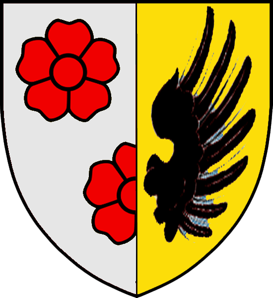 Vapensköld för svenska adelsätten Kruuse af Verchou